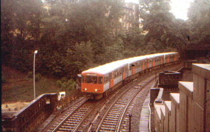 U-Bahn-Zug der Baureihe DT 2 am Stintfang in St. Pauli